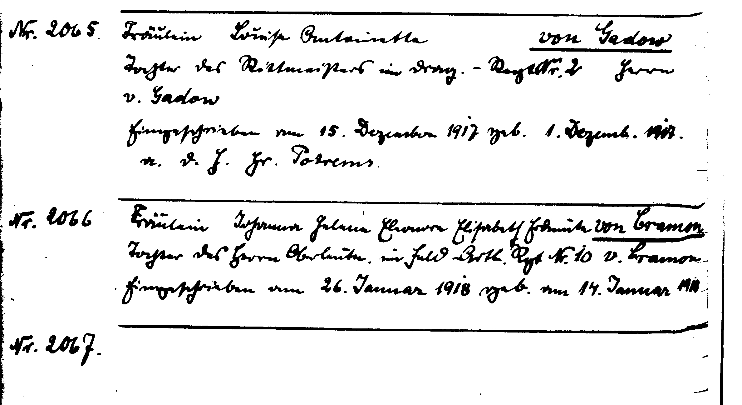 Letzte Einschreibungen im Einschreibebuch des Klosters Dobbertin